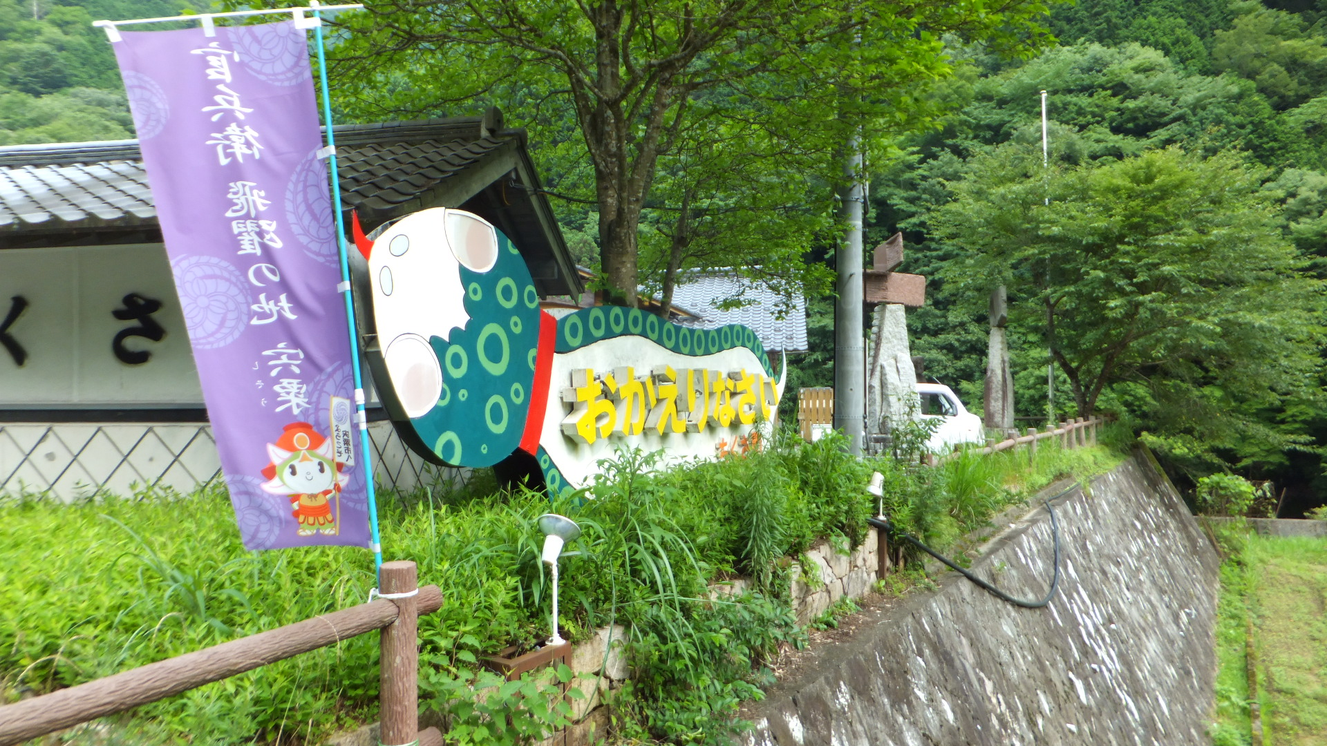 道の駅ちくさ（2014年7月14日）